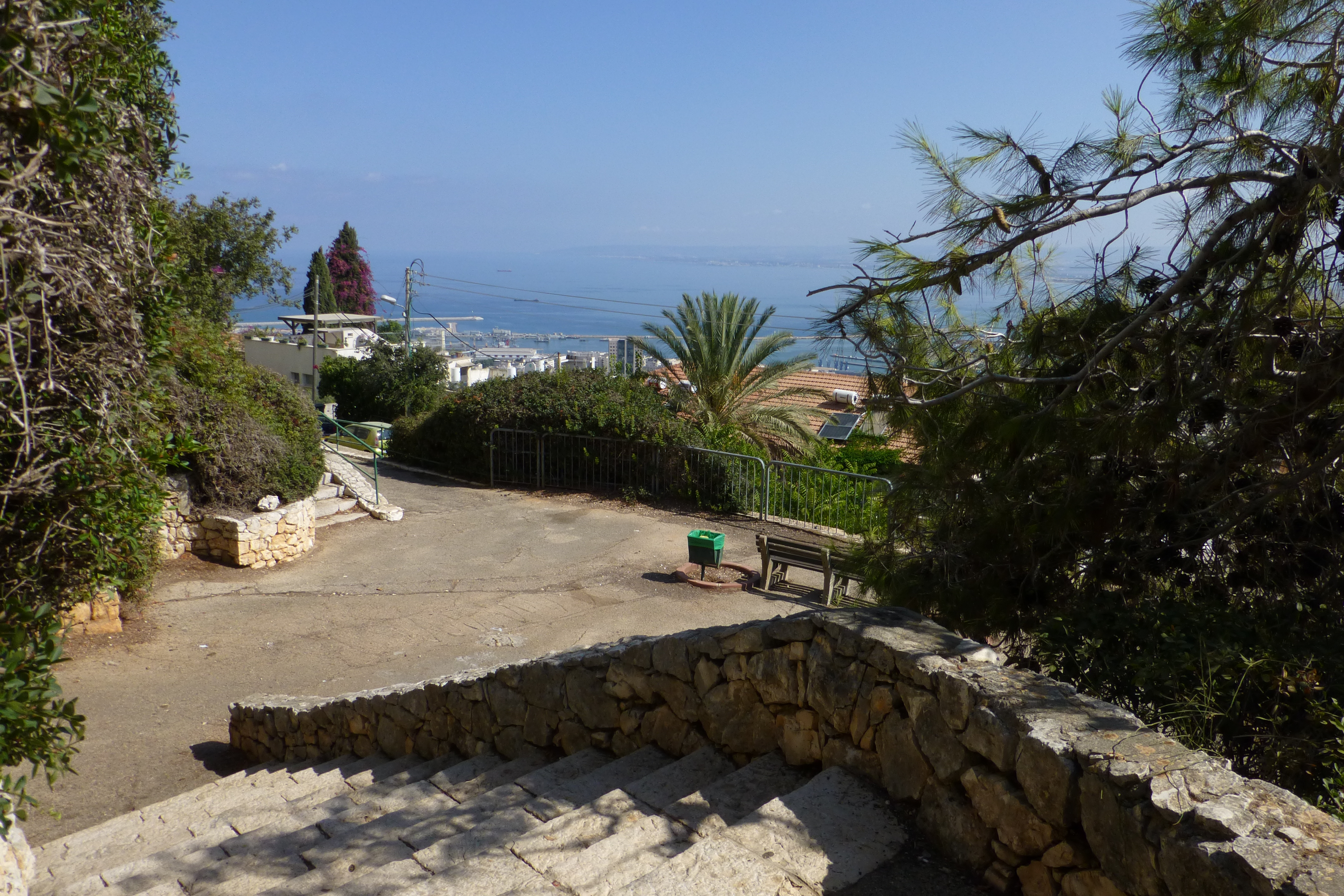 גן אלנבי - רח' יפה נוף 120, מרכז הכרמל, חיפה